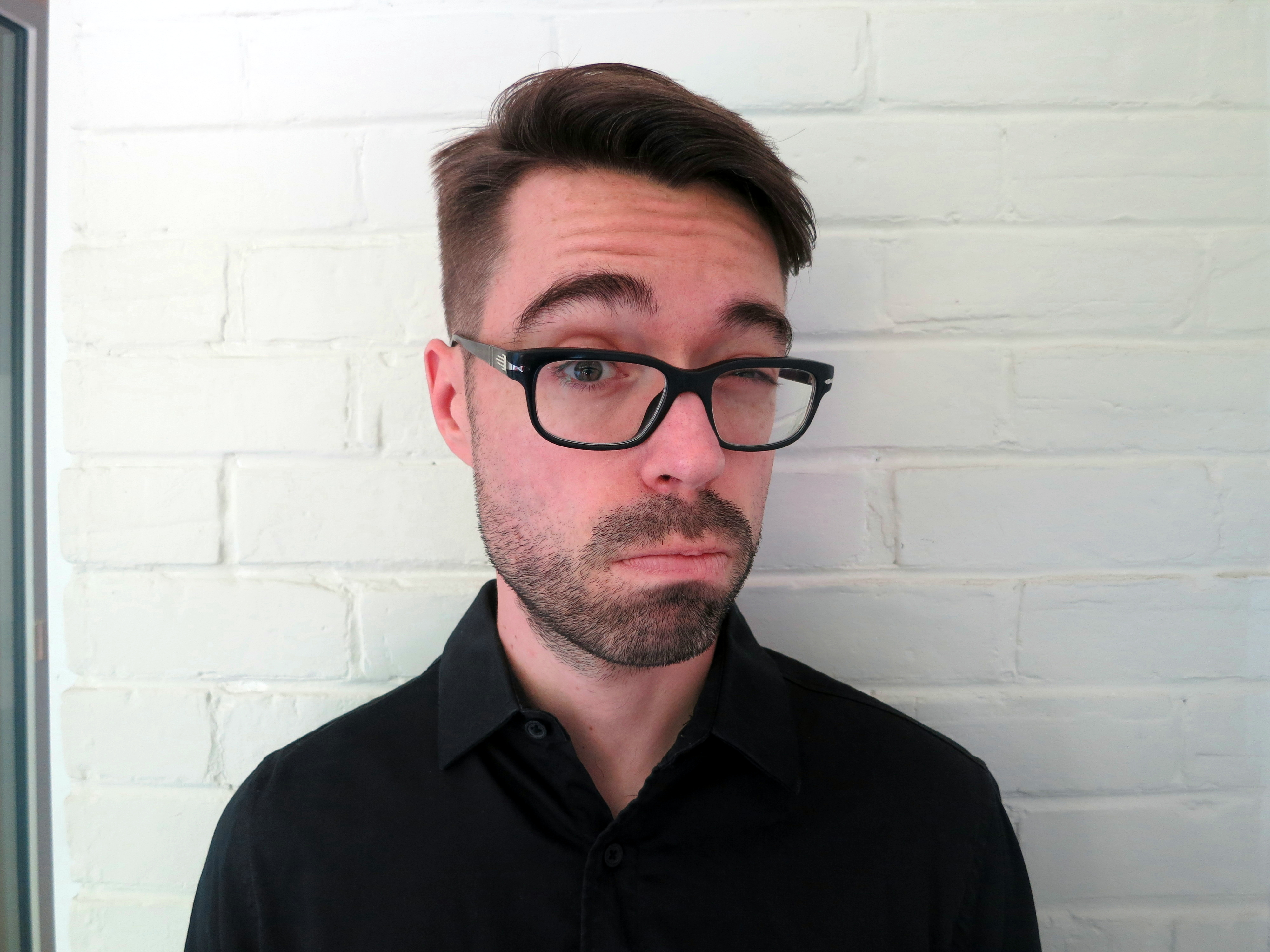 Olivier Bernard Le Pharmachien